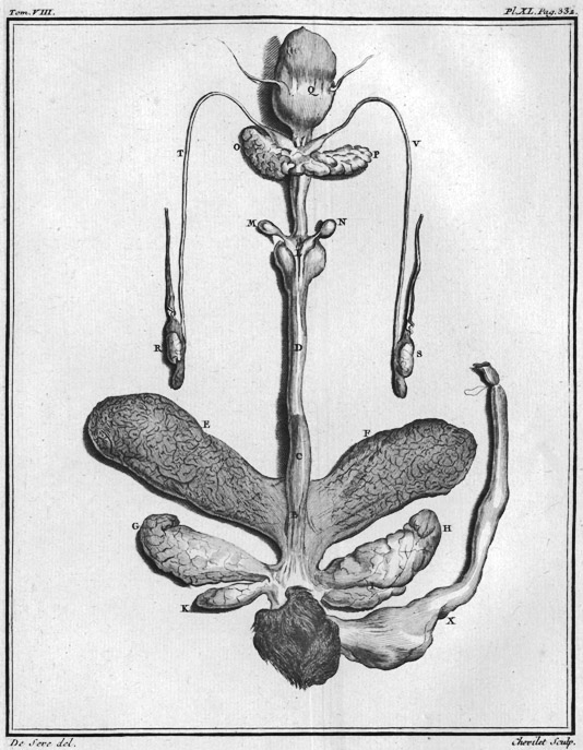 Dessin de jacques de Sève, gravure de Juste Chevillet, HN VIII, 1760, Planche XL, p 332, qui est l'une des gravures illustrant "l'Histoire naturelle, générale et particulière, avec la description du cabinet du Roy", de Georges Louis Leclerc Buffon (pour consulter l'article [1])